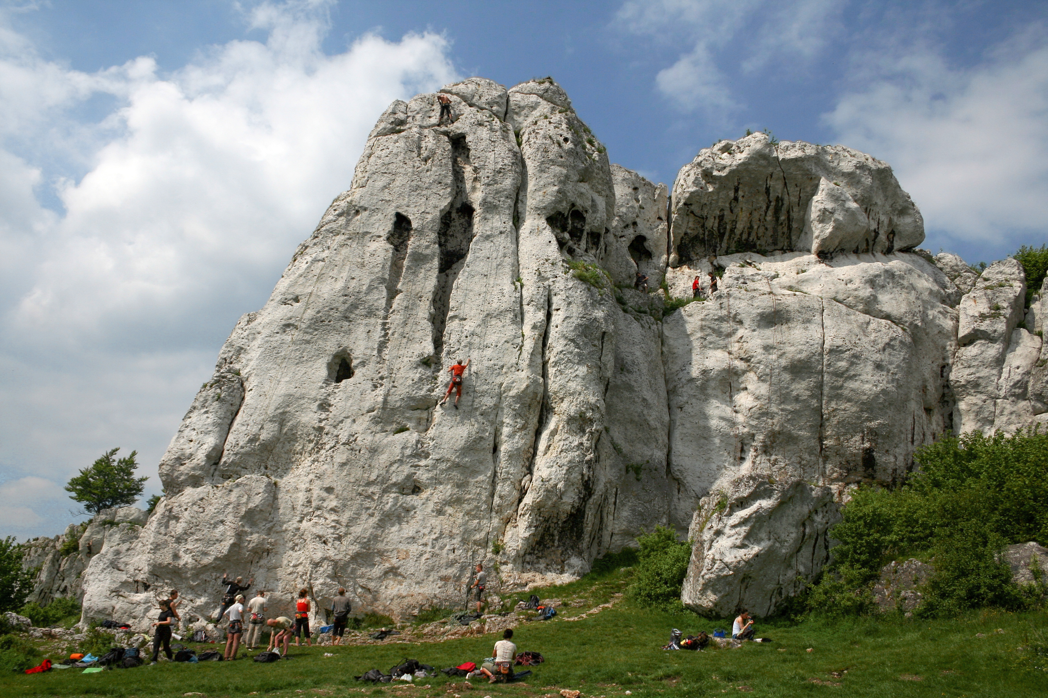 Skały Rzędkowickie. Turnia Lechfora.